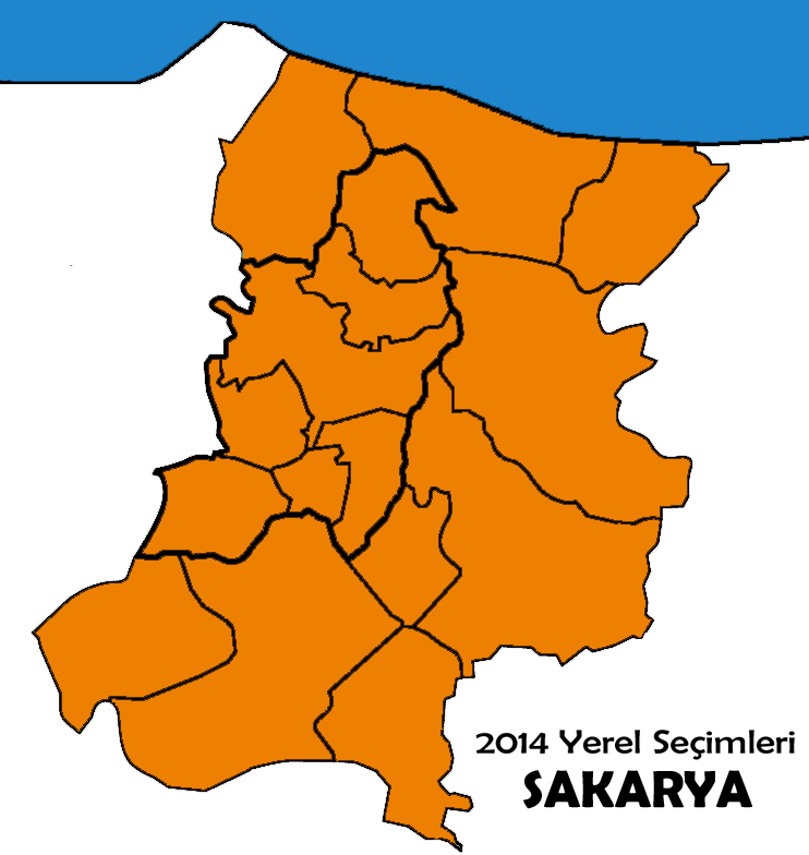 2014 yerel seçim sonuçları